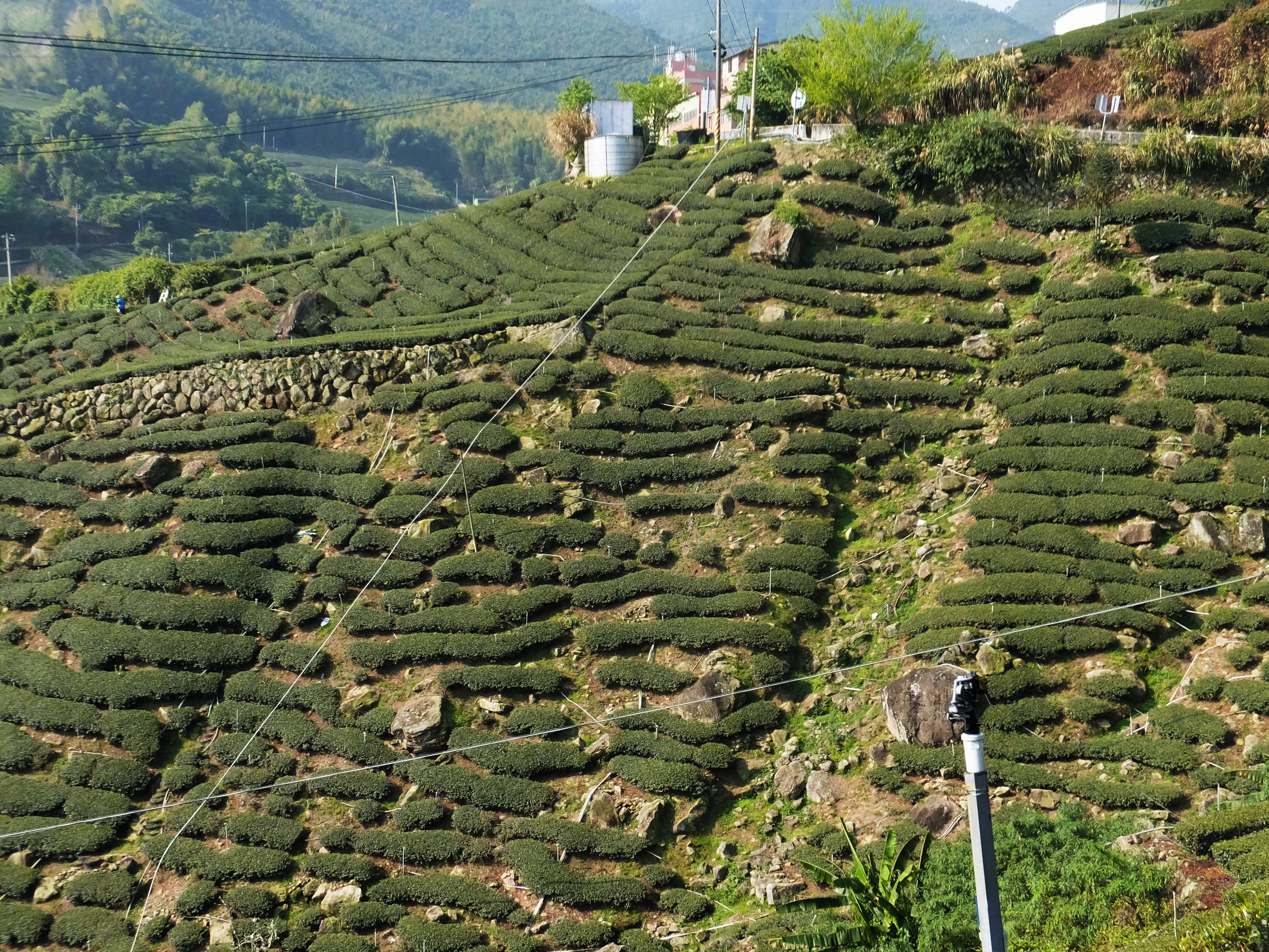 茶園 Tea gardens